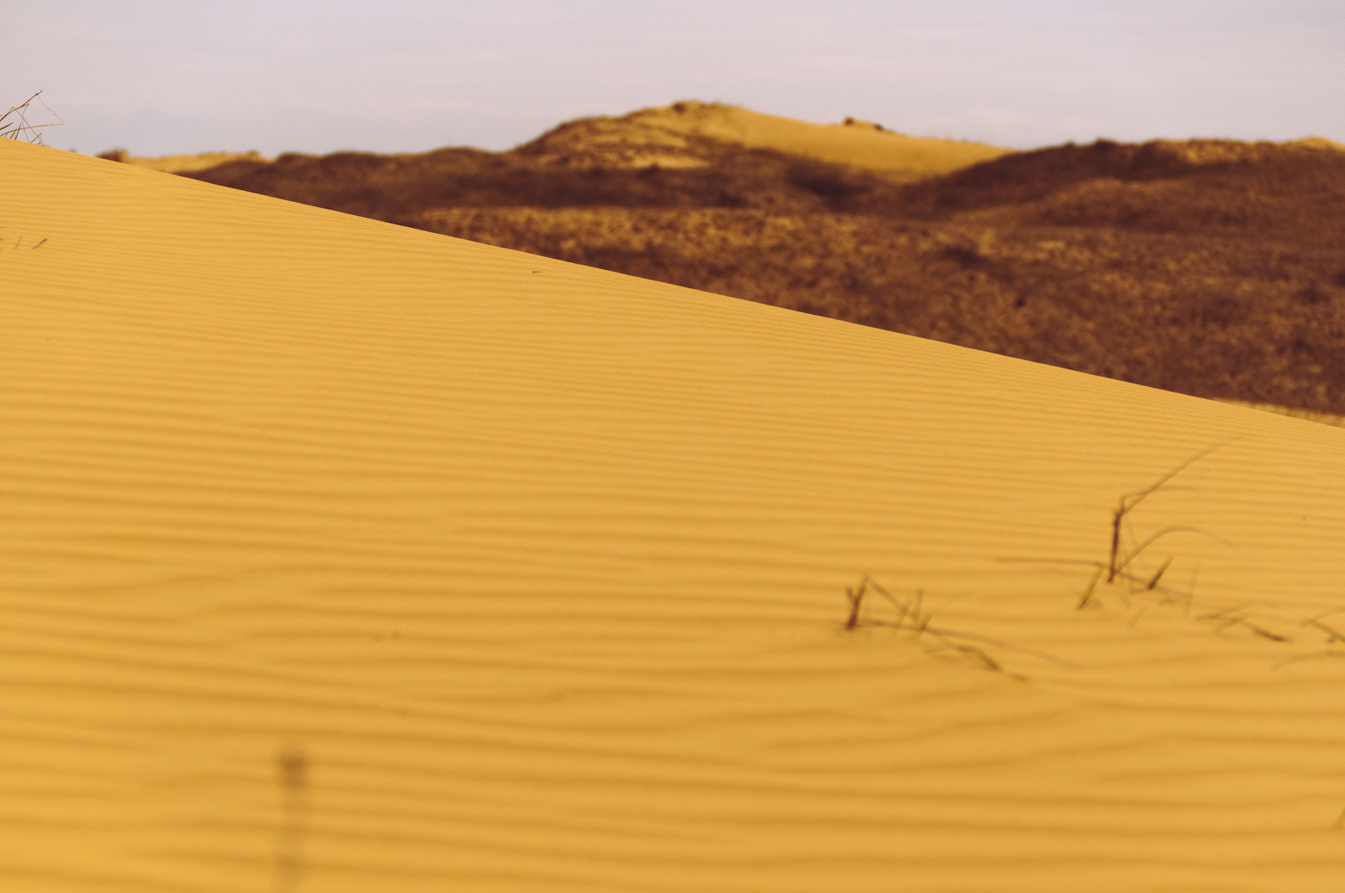 Олешківські піски, Цюрупинський район, вул. Заводська, 1в, с. Раденськ